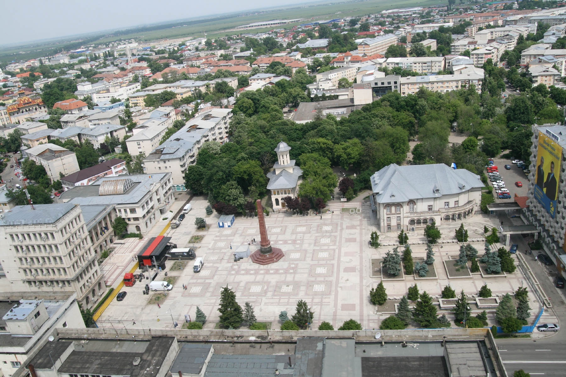 Ansamblul „Piața Unirii”